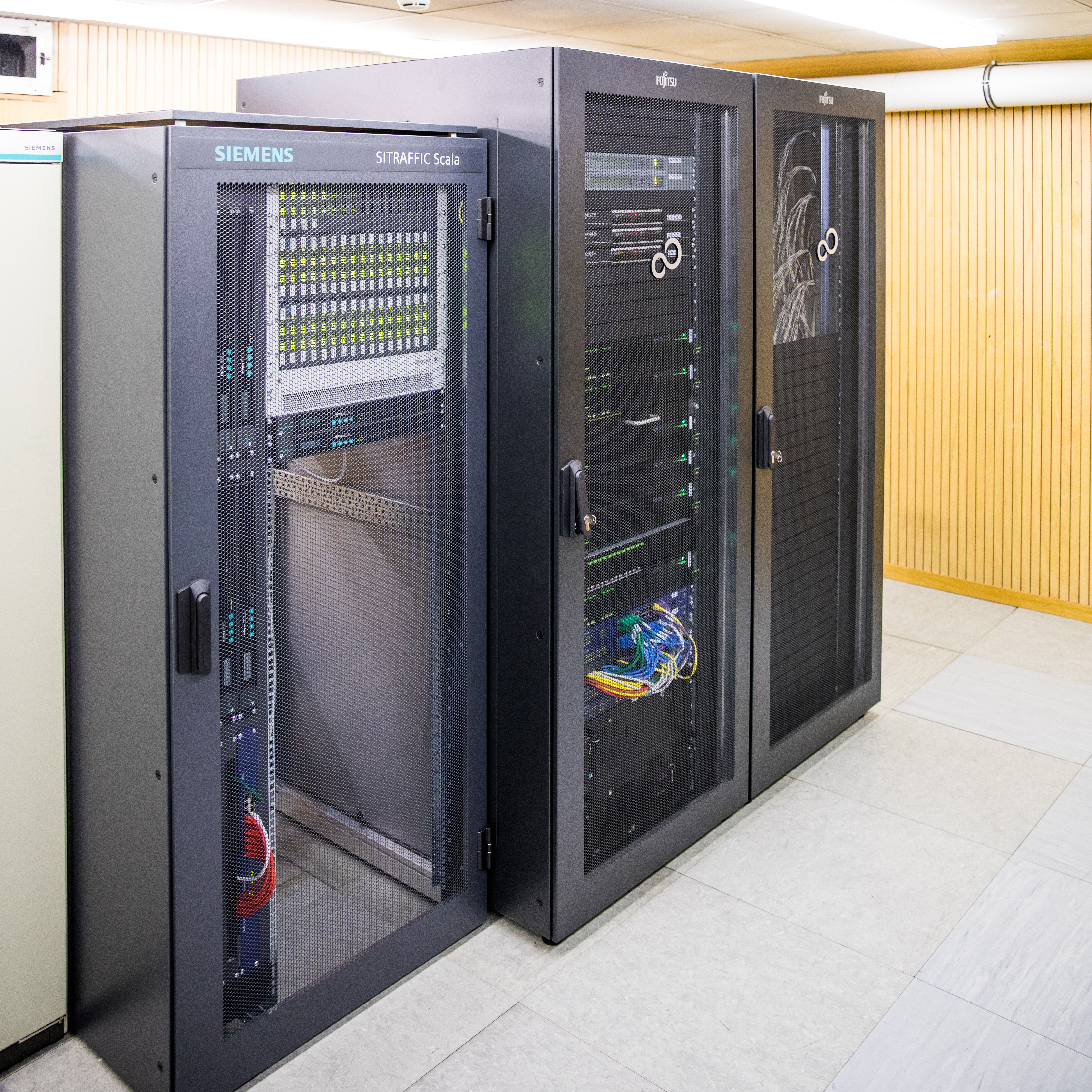 Pressetermin zur Vorstellung des neuen Verkehrsrechners der Stadt Köln Foto: Der neue Verkehrsrechner von Siemens „Sitraffic Scala“